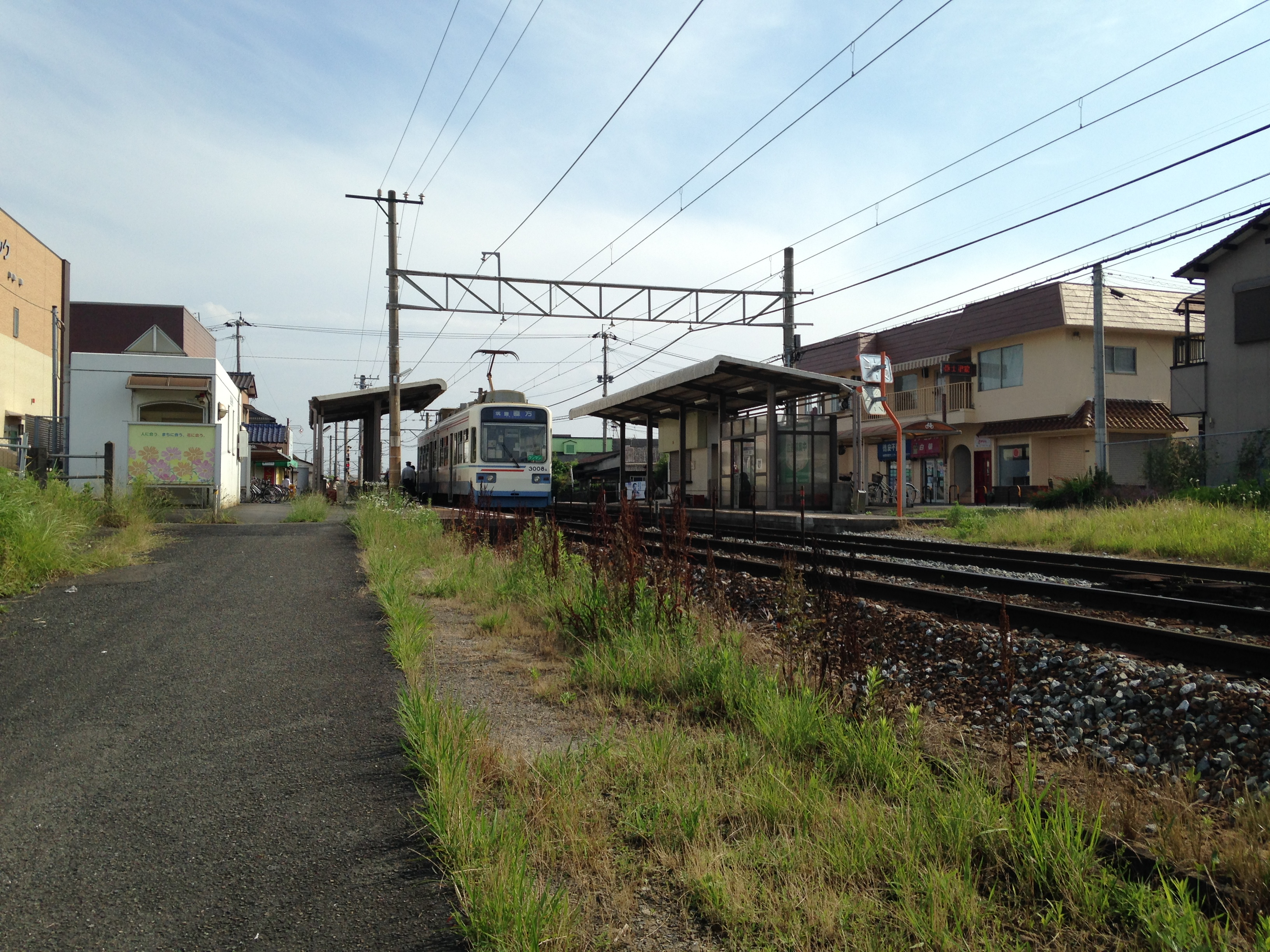 北側より望む希望が丘高校前駅